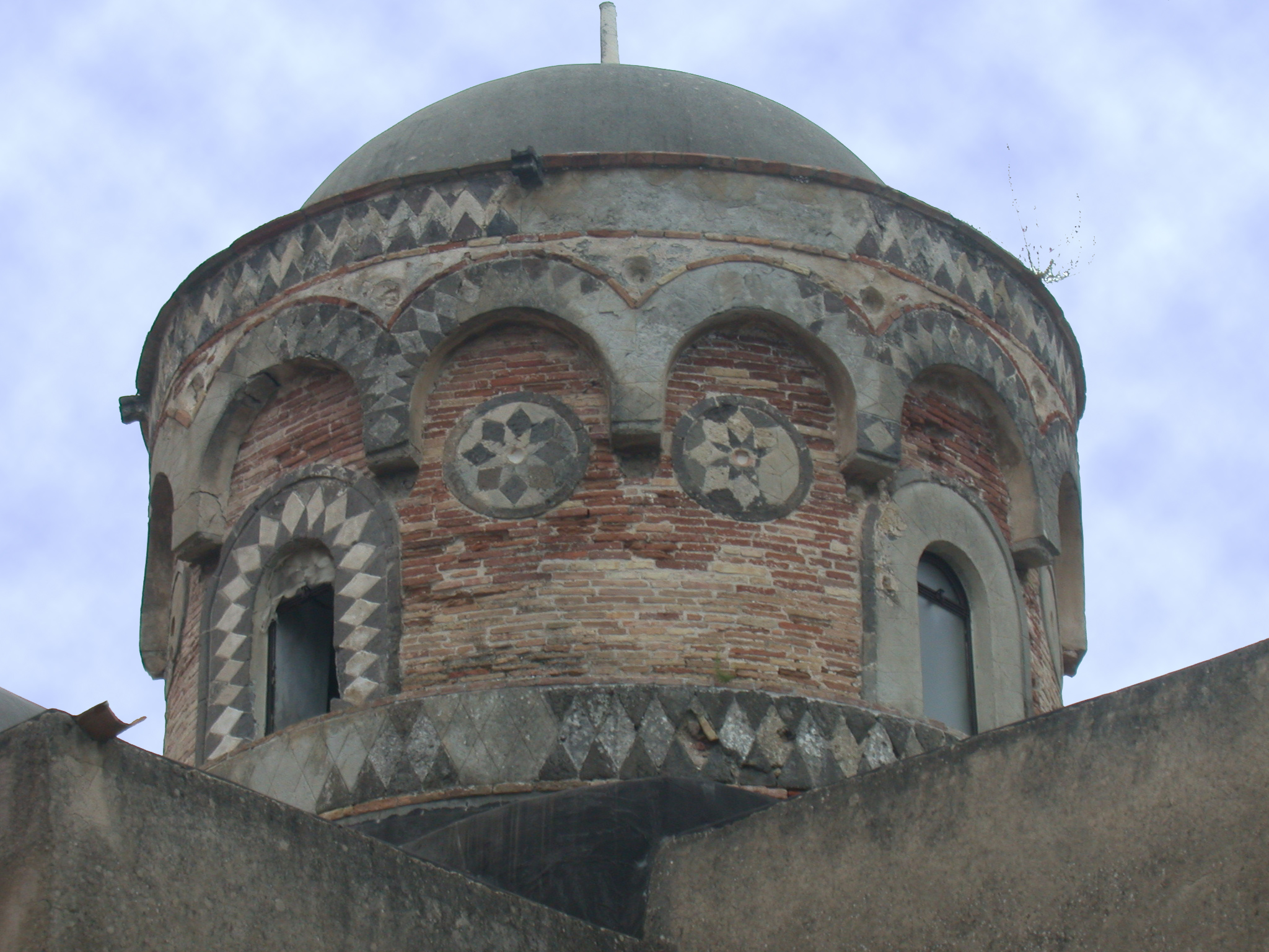 Gaeta (provincia di Latina, Lazio, Italia), cupola decorata della chiesa di San Giovanni a Mare.